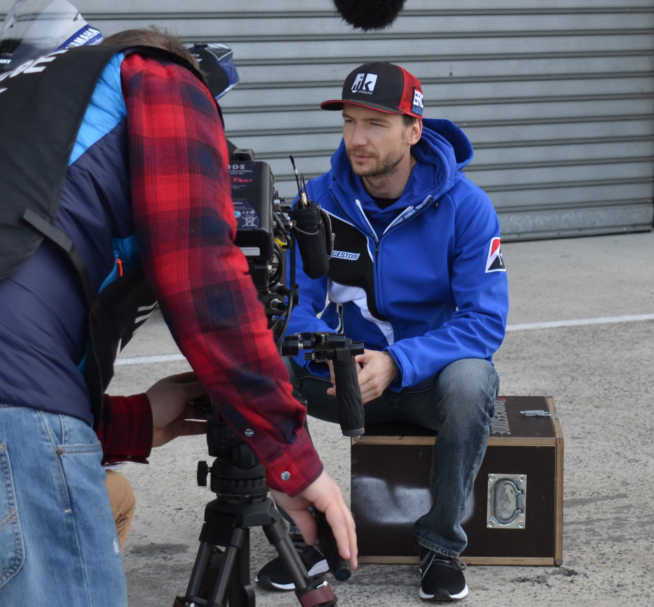 Max Neukirchner aux pré-Mans 2017